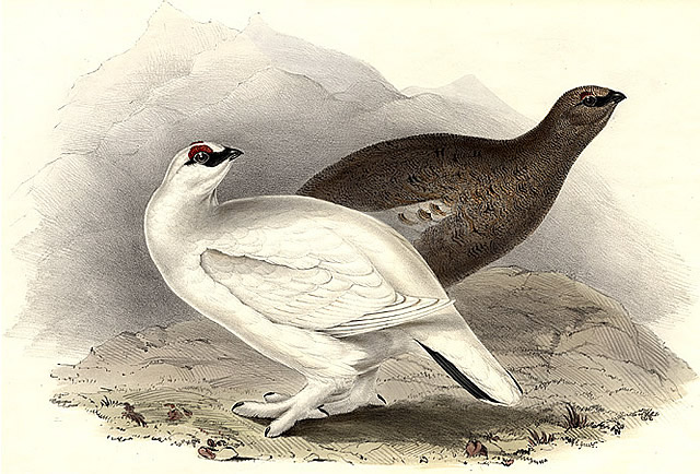 Lagopus muta (Rock Ptarmigan)